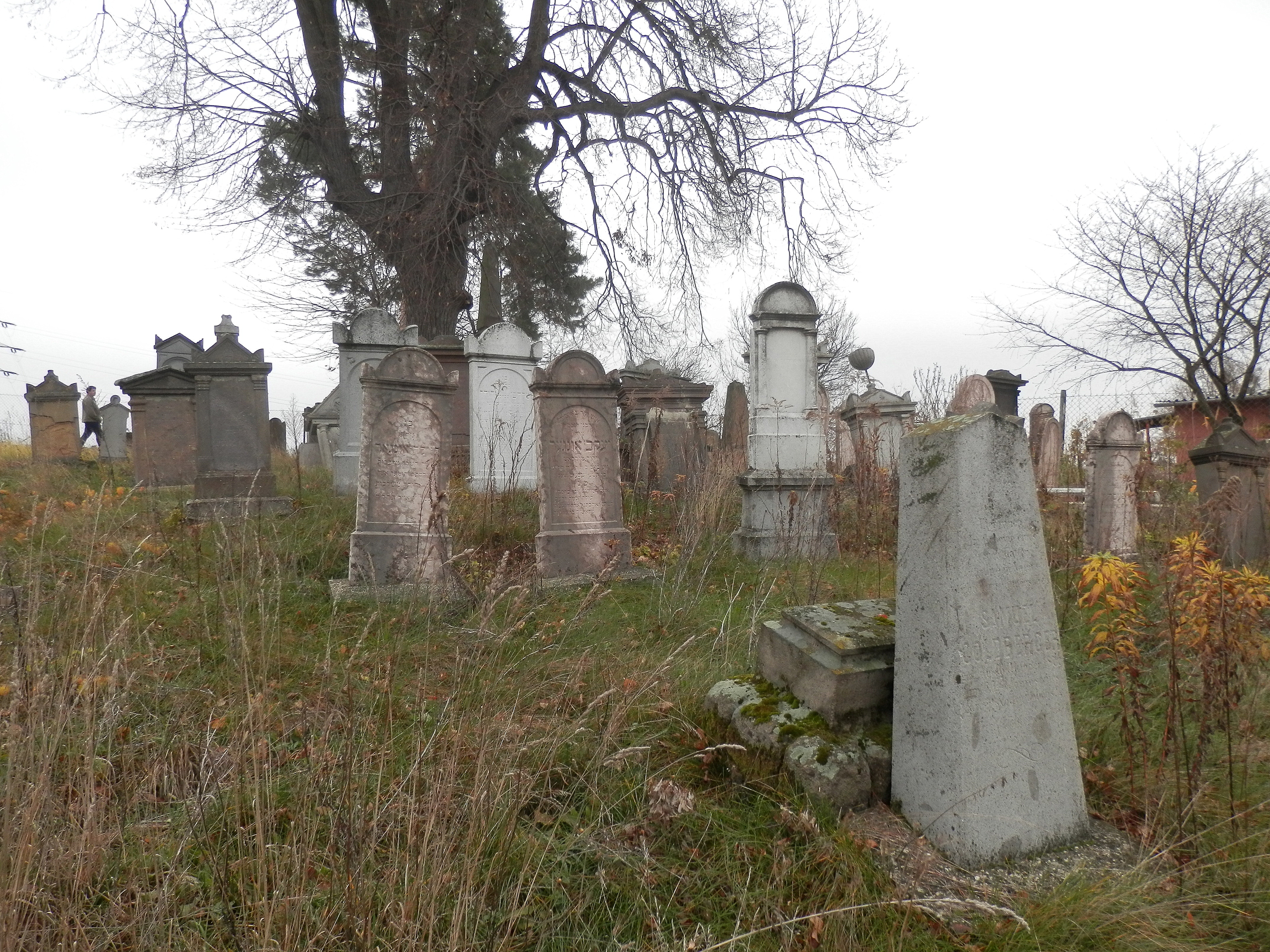 Historický ortodoxný židovský cintorín mesto Prešov. Ulica Tehelná.